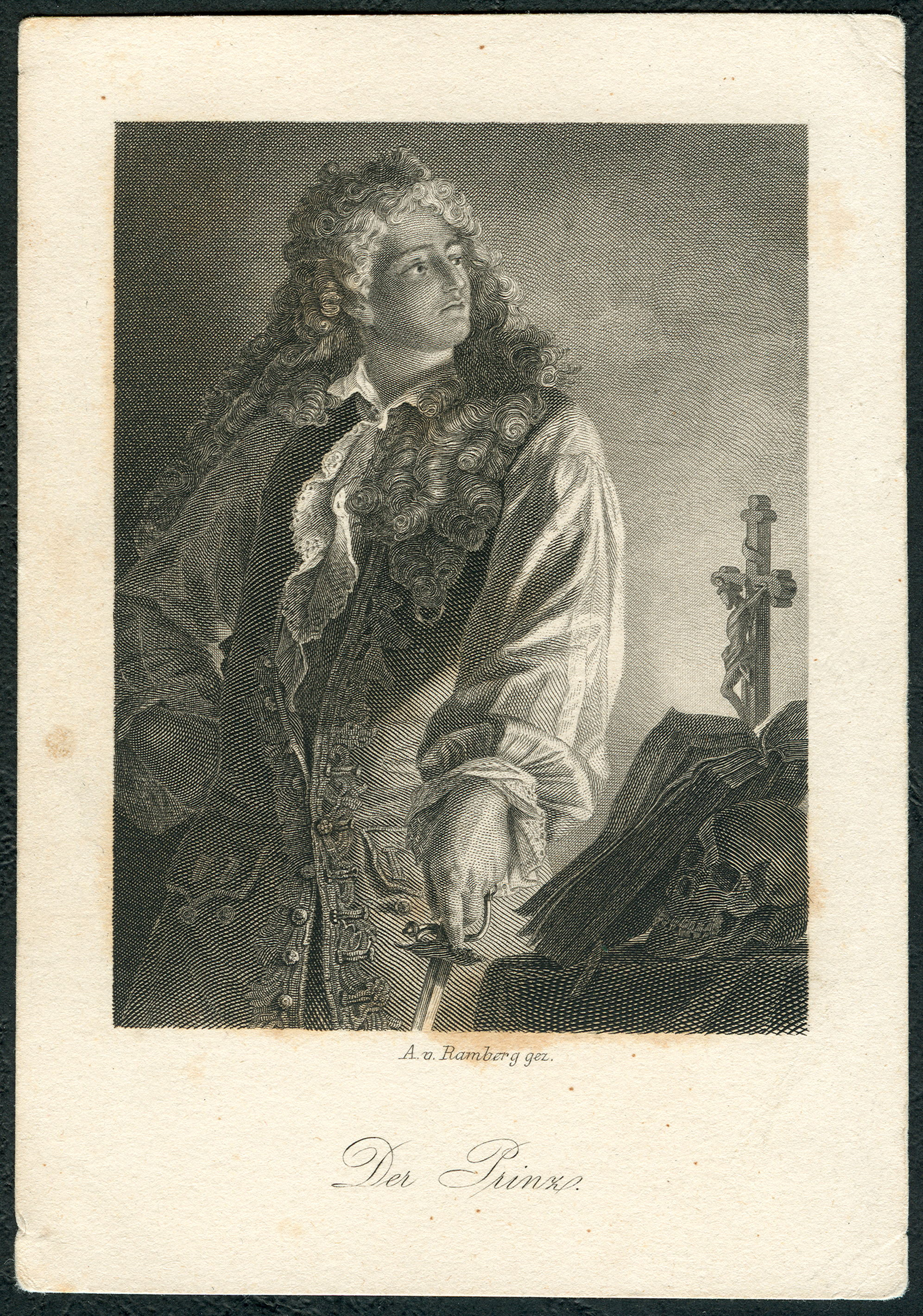 Der Prinz aus Friedrich Schillers Der Geisterseher, als Stahlstich gestochen von Conrad Geyer um 1859 nach einer Zeichnung von Arthur von Ramberg; das untertitelte Blatt hat die Maße 8 cm x 11,6 cm und hat auf der Rückseite keine weiteren Angaben. Es gehört zu einer Serie, möglicherweise als frühes Sammelbild, die als Schiller-Galerie von Friedrich Pecht und von Arthur von Ramberg bekannt geworden ist.